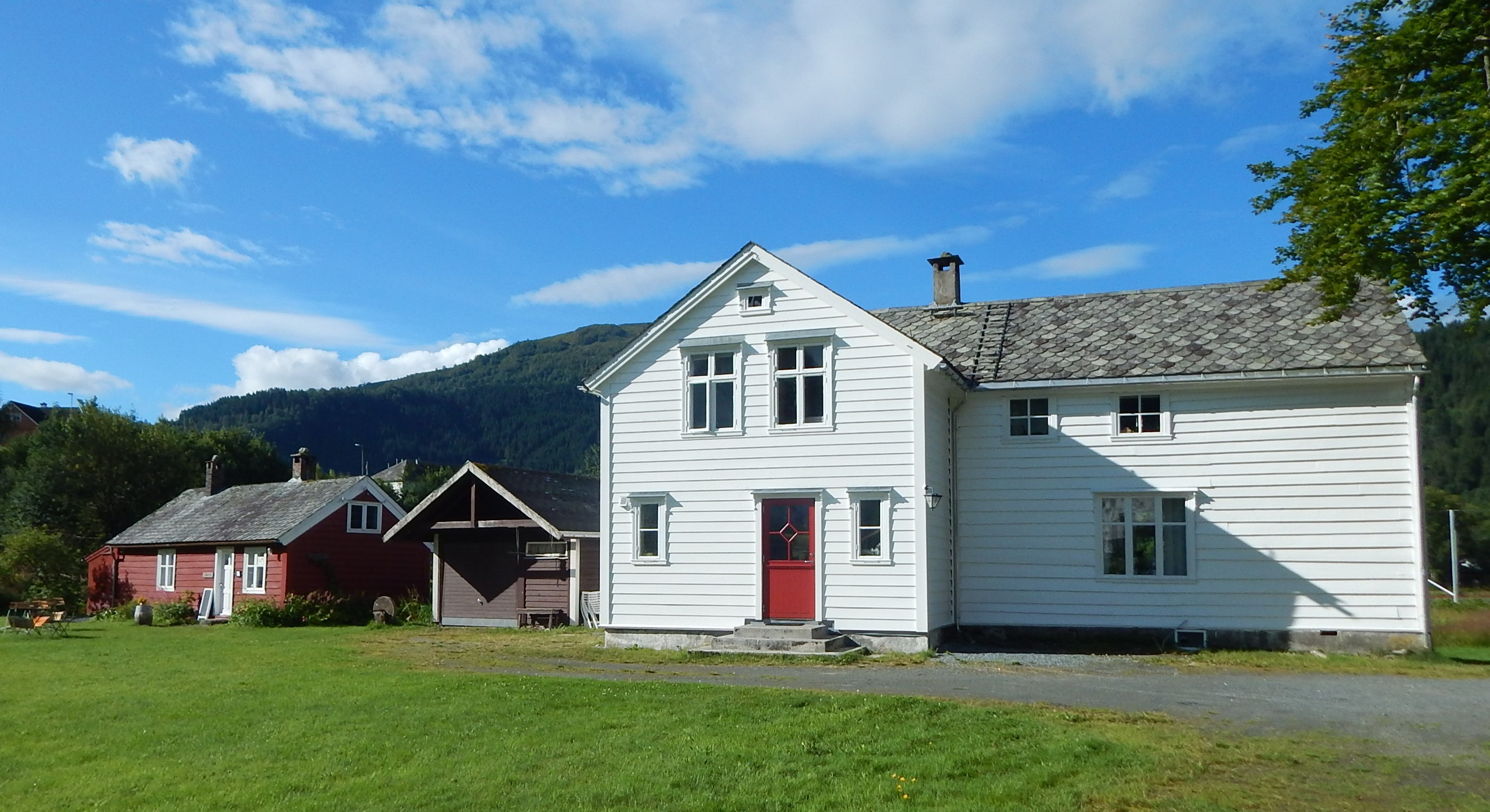 Jakob Sande-tunet (klokkergården i Dale)